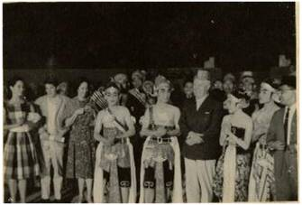 Dokumentasi pemeran utama Sendratari Ramayana, Rama (Tunjung Sulaksono) dan Sinta (Sumaryaning) bersama Charlie Chaplin dan GPH Suryohamijoyo di PanggungTerbuka Roro Jonggrang (1961).